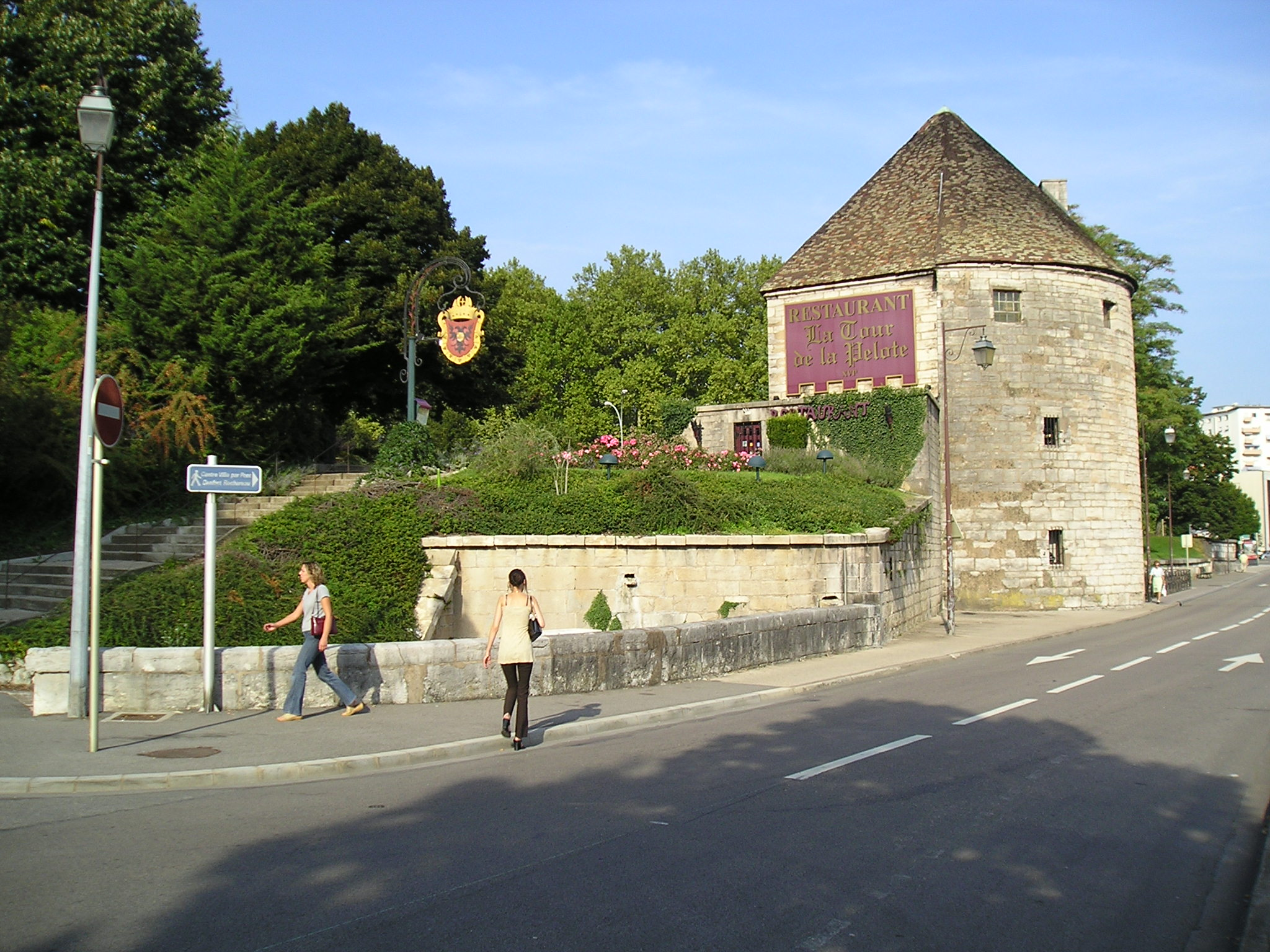 Tour de la Pelote à Besançon, France